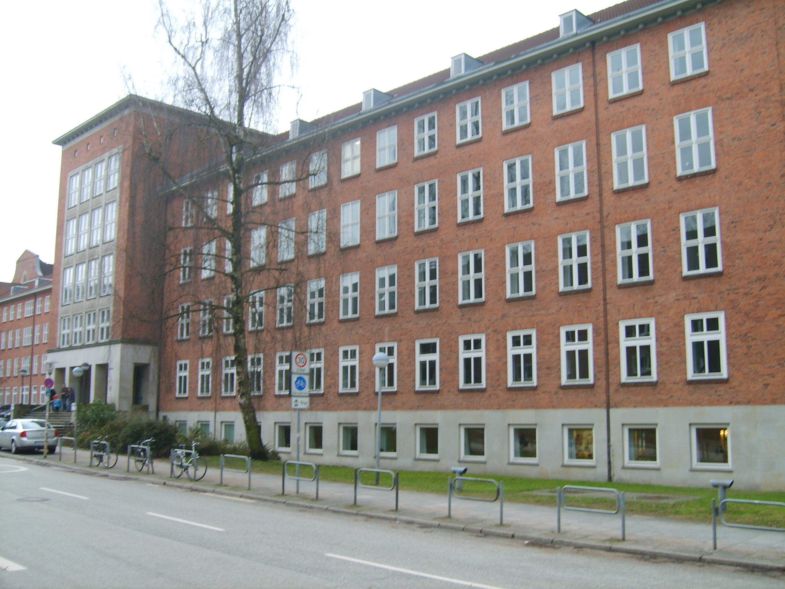 Landgericht Kiel, Germany